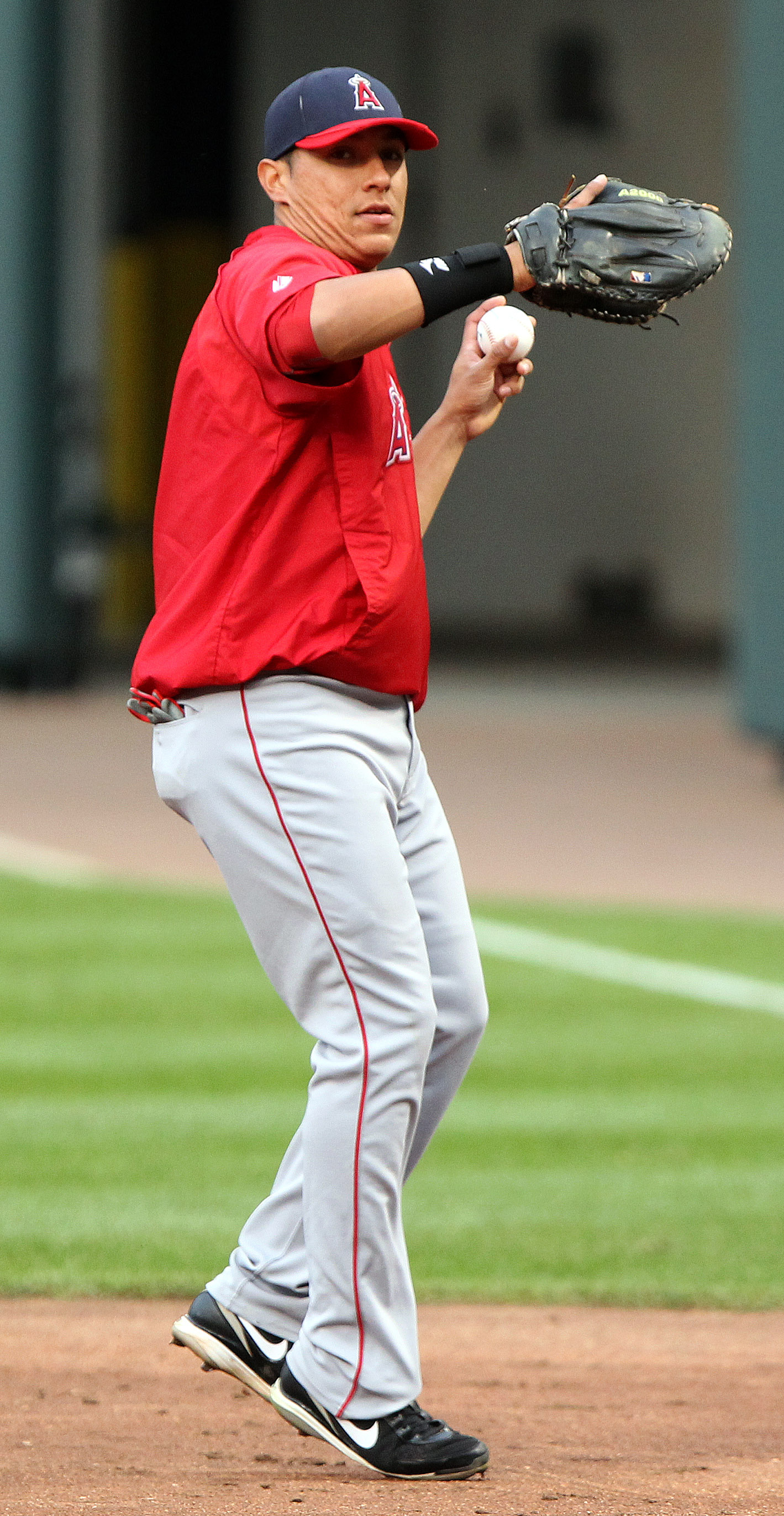 Efren Navarro